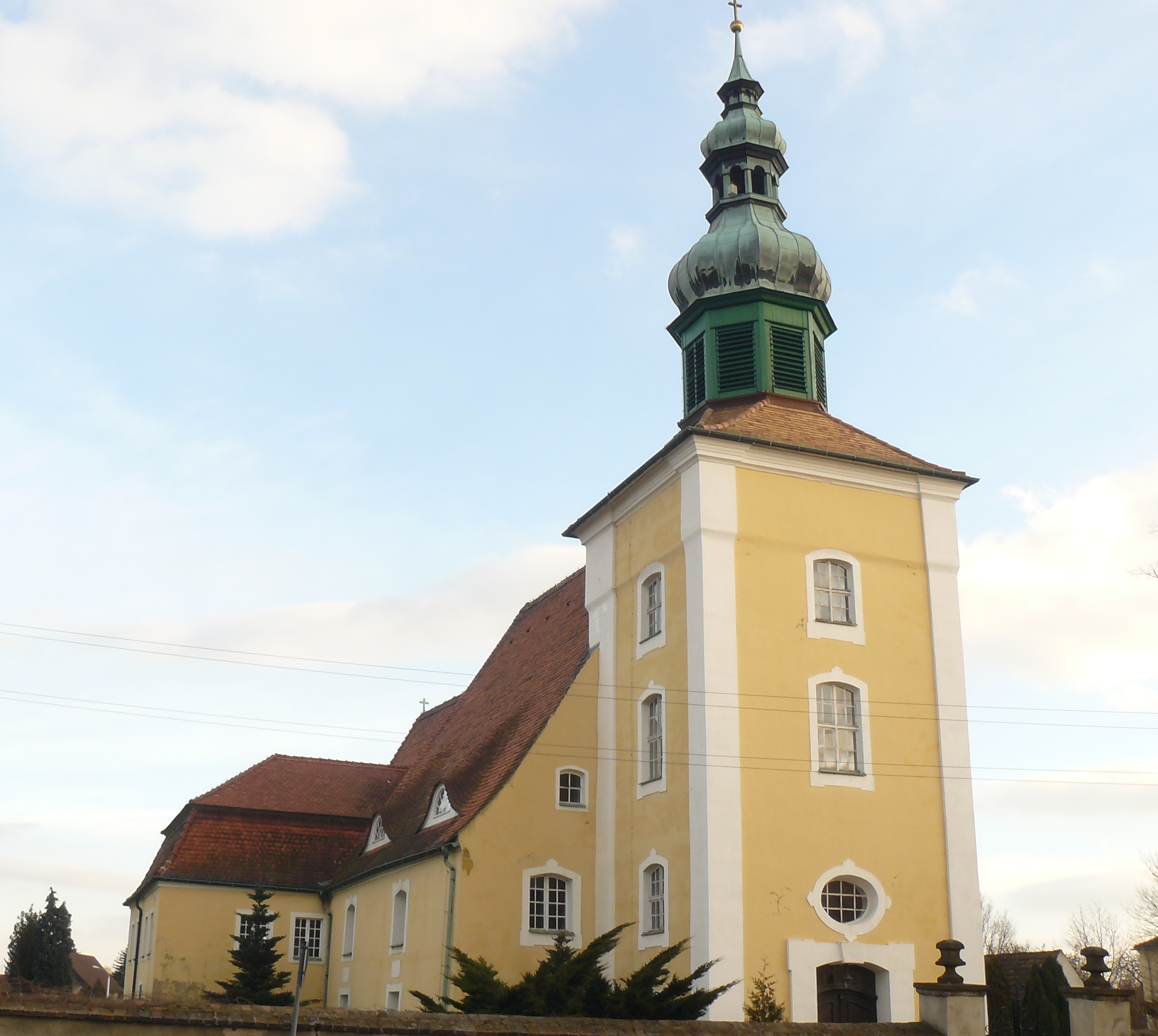 Evangelische Kirche in Klitten (Landkreis Görlitz) Hornjoserbsce: Ewangelska cyrkej w Klětnom, gmejna Hamor